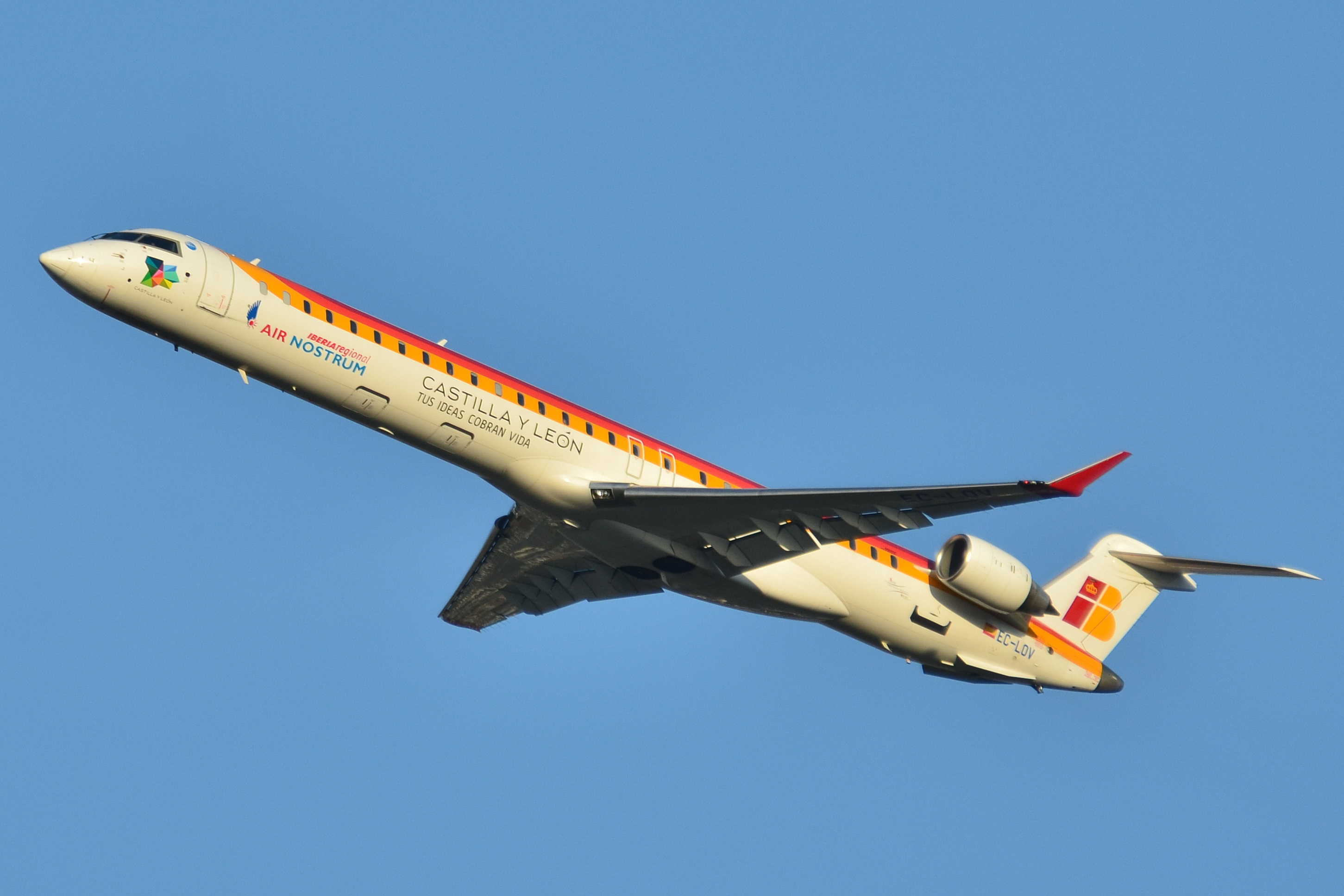 Photo prise à l'aéroport de Toulouse-Blagnac (LFBO) en France. Picture take at Toulouse-Blagnac Airport (LFBO) in France.